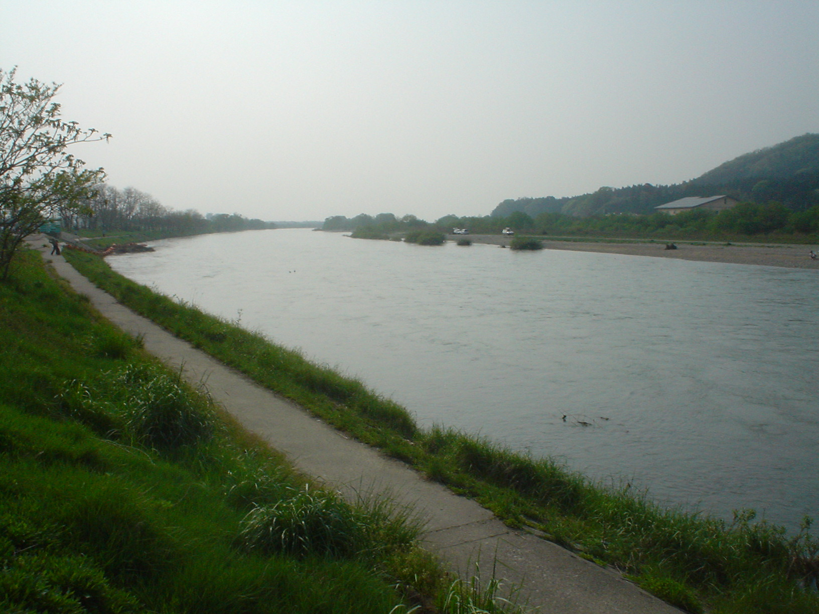 Miomote River in Niigata, Japan.ja: 三面川（新潟県村上市大字村上の三面川中州公園より下流方）